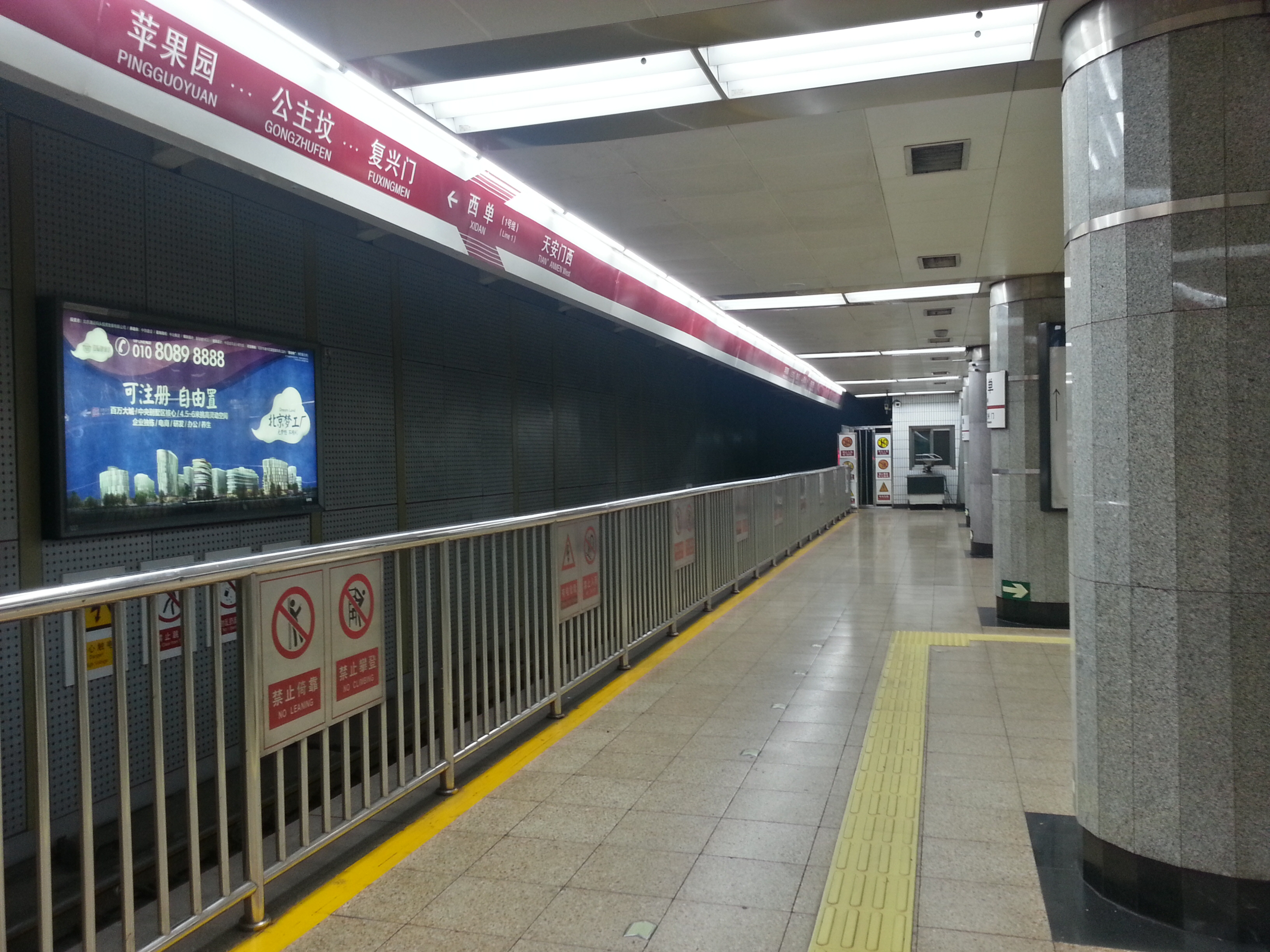 西单站8编预留